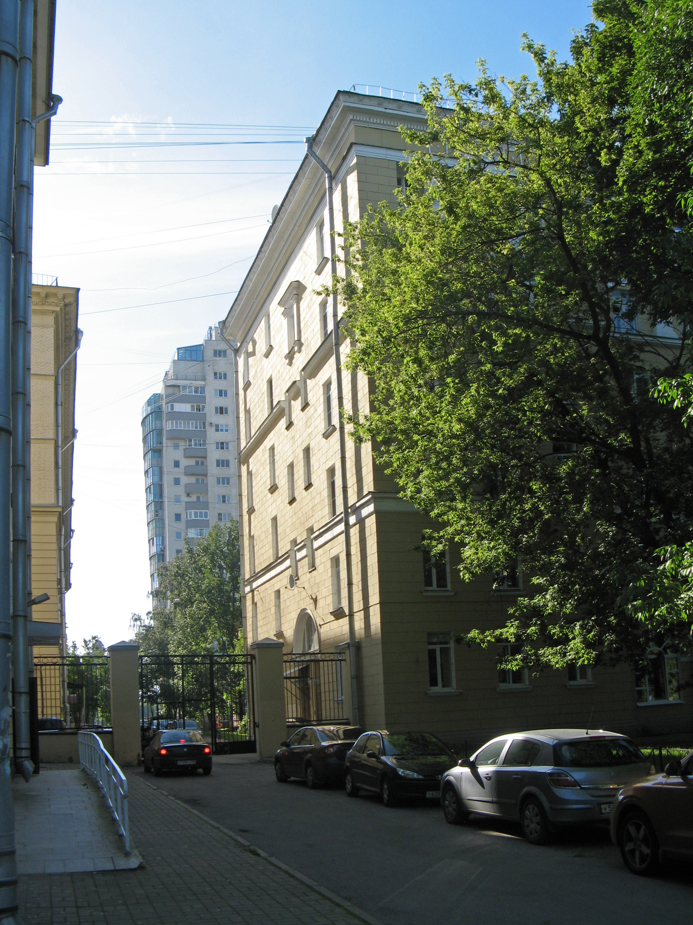 Улица Молдагуловой, Санкт-Петербург